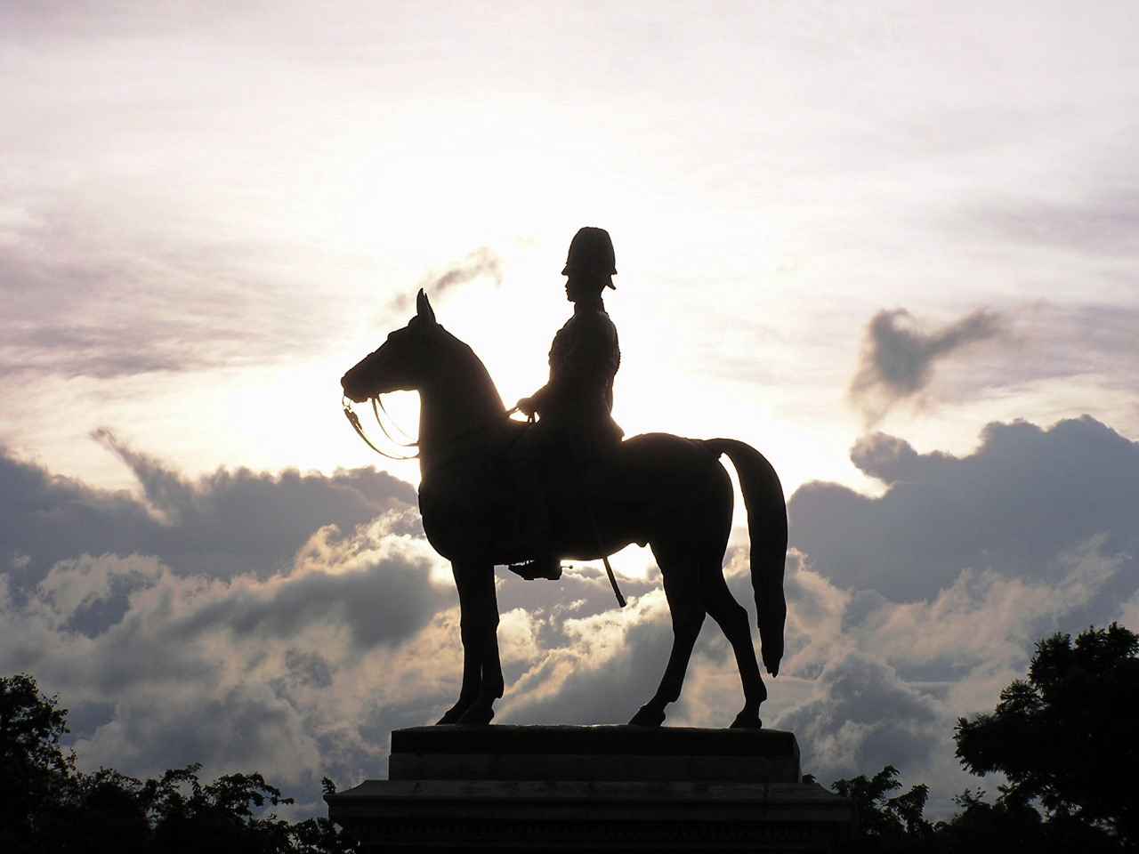 King Rama V Equestrian Monument, Dusit Palace, Bangkok, Thailand